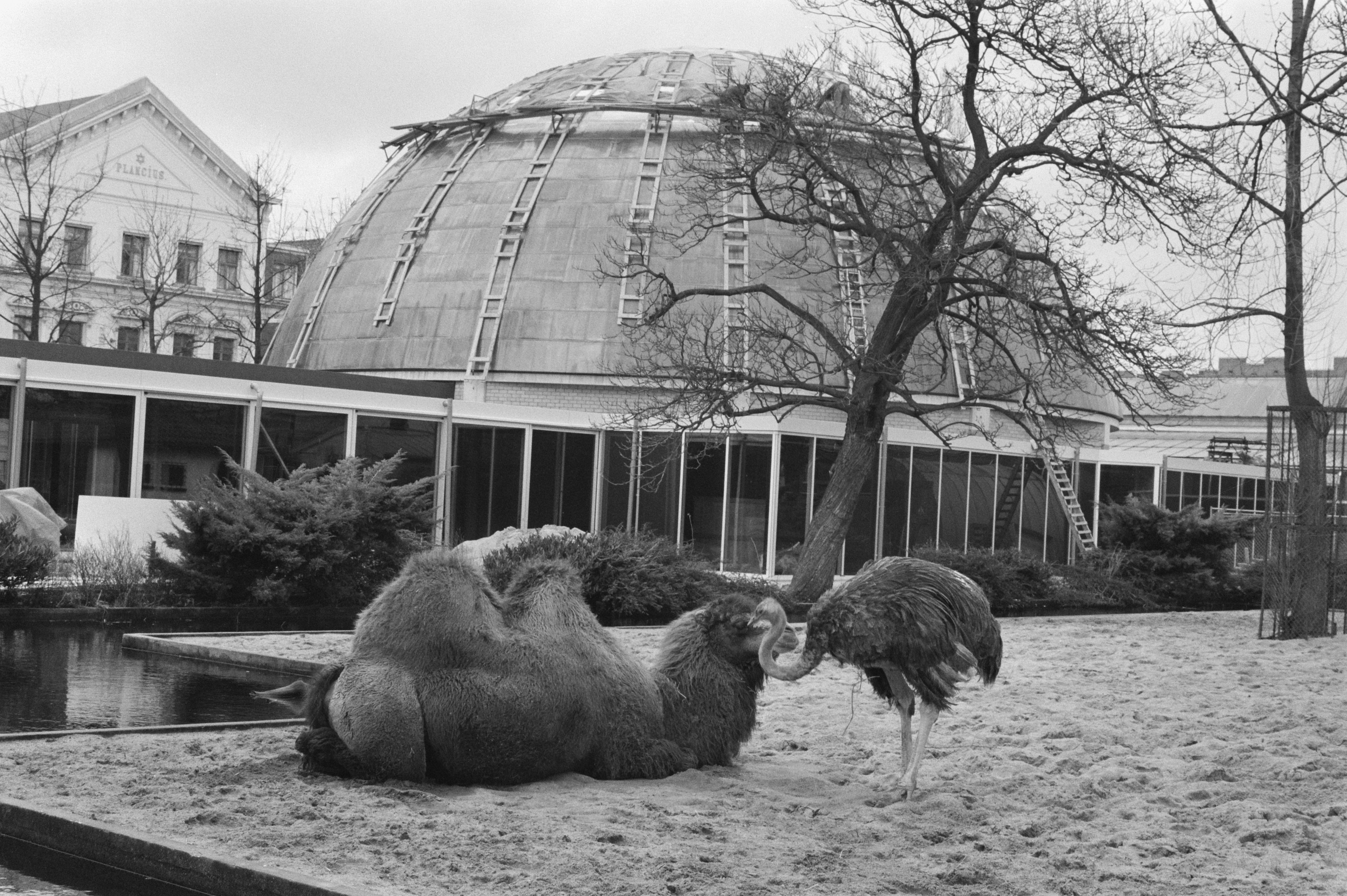 Collectie / Archief : Fotocollectie Anefo Reportage / Serie : [ onbekend ] Beschrijving : Bouw Zeiss Planetarium Artis Datum : 2 februari 1988 Locatie : Amsterdam, Noord-Holland Trefwoorden : dierentuinen, gebouwen, kamelen, planetaria, struisvogels Instellingsnaam : Zeiss Fotograaf : Bogaerts, Rob / Anefo Auteursrechthebbende : Nationaal Archief Materiaalsoort : Negatief (zwart/wit) Nummer archiefinventaris : bekijk toegang 2.24.01.05 Bestanddeelnummer : 934-1813